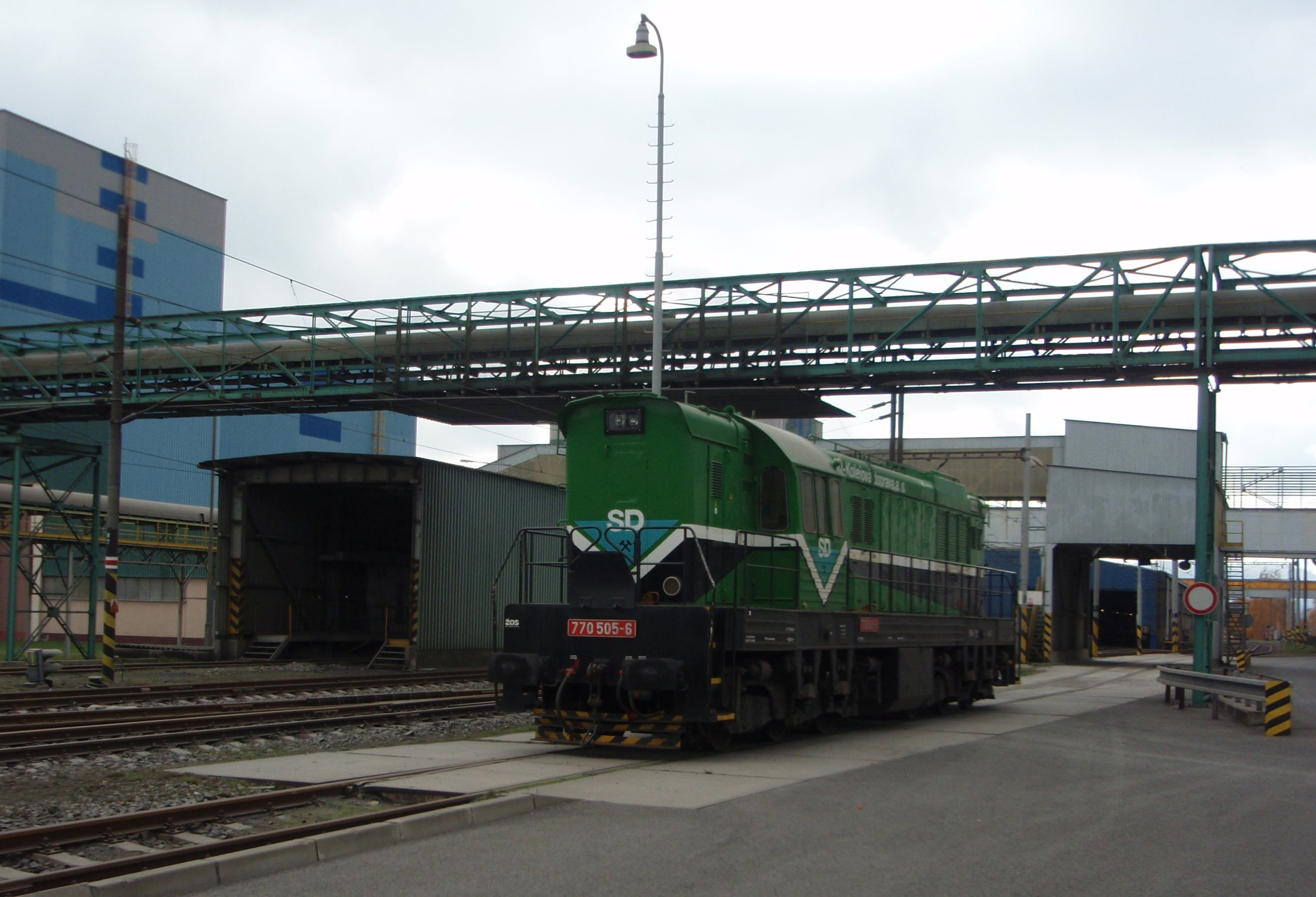 Lokomotiva řady 770 společnosti SD - Kolejová doprava a. s. v areálu elektrárny Prunéřov I